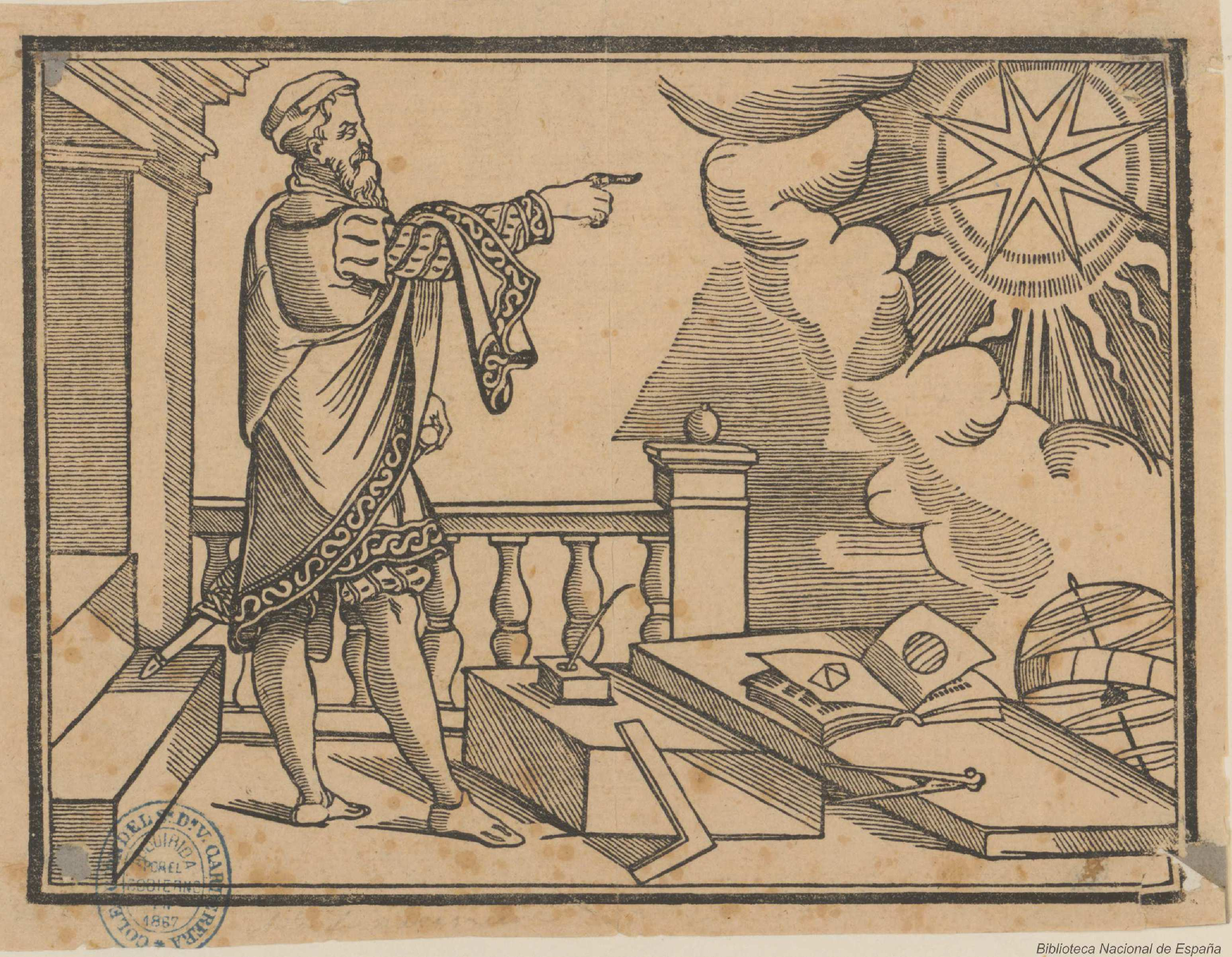 Retrato de Martín Cortés, ilustración del Breve compendio de la sphera y de la arte de navegar, Sevilla, 1556. Biblioteca Nacional de España